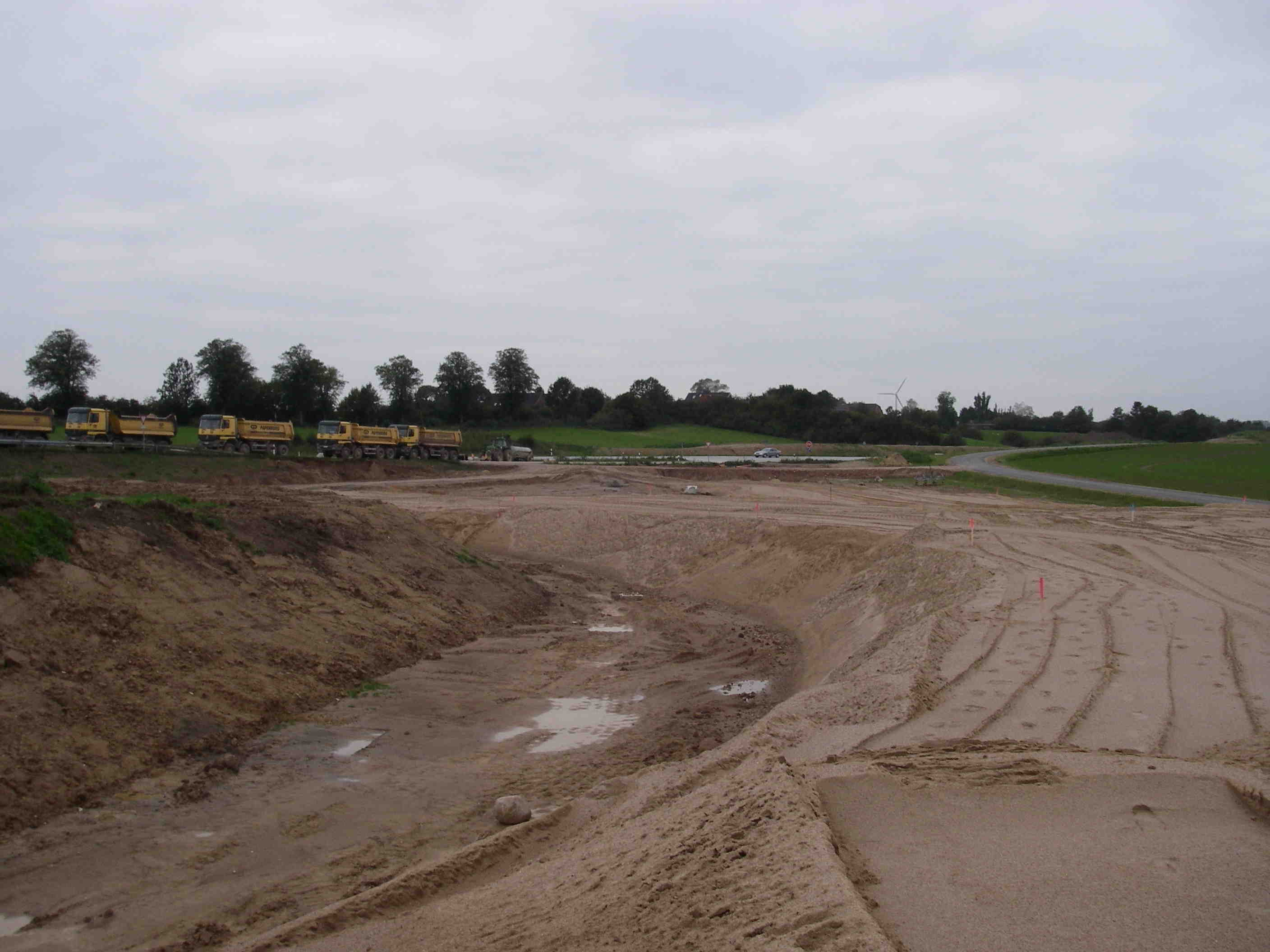 Autobahnausfahrt Geschendorf in früher Bauphase